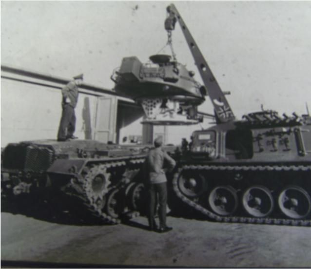 Turmzug am Kpz M 48